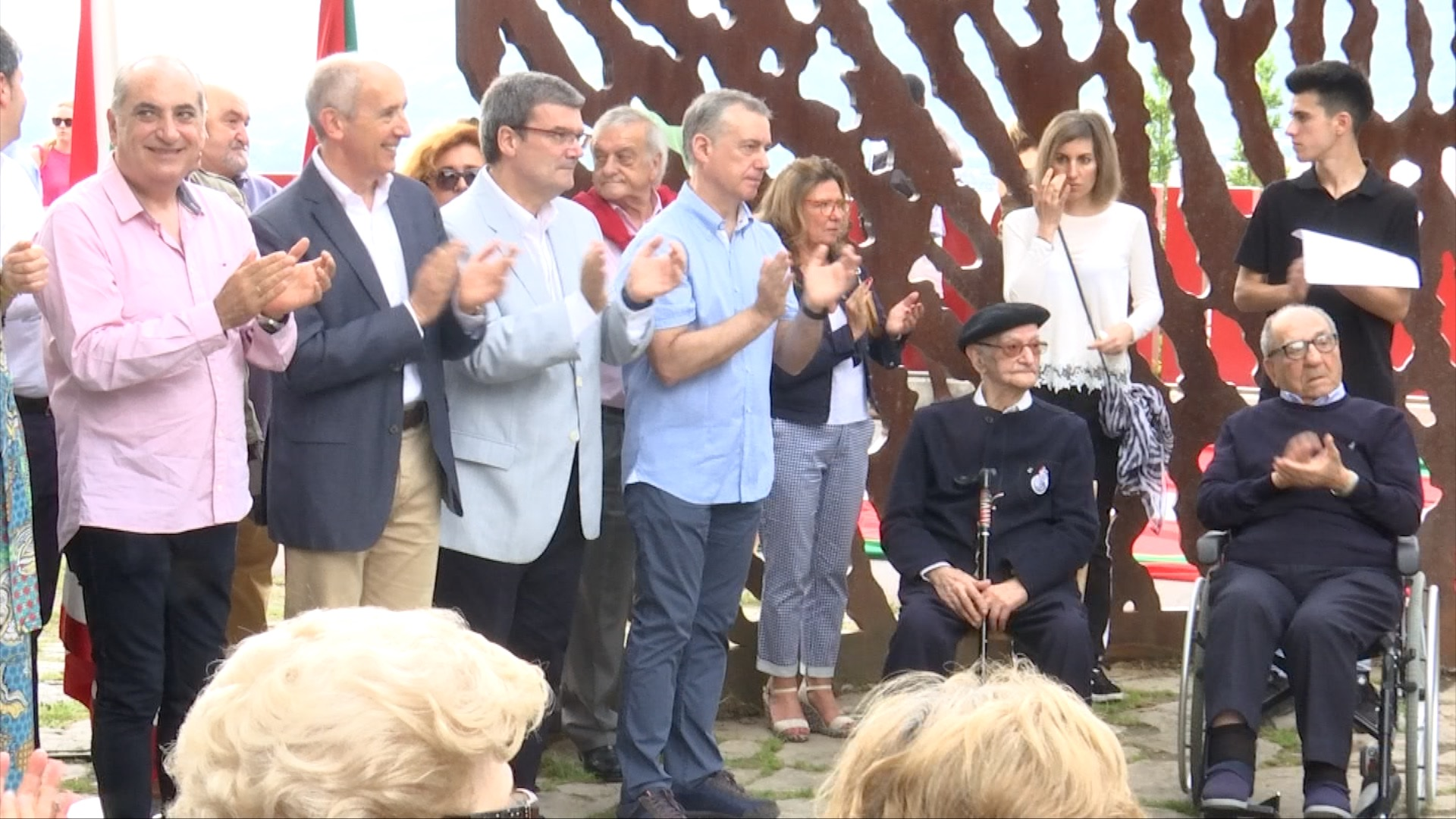 Zutik ezkerretik, Iñaki Arriola eta Josu Erkoreka Eusko Jaurlaritzako sailburuak, Juan Mari Aburto Bilboko alkatea, eta Iñigo Urkullu lehendakaria. Eserita, bigarrena eskumatik, José Moreno gudari beteranoa da, 100 urtekoa.